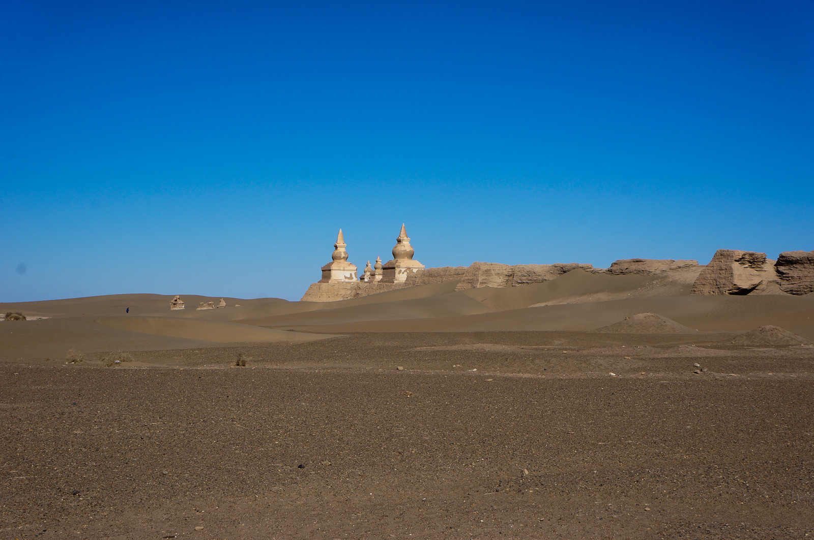 Vue extérieure de Khara-khoto (Chine)